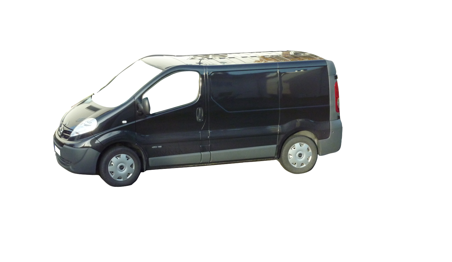 En Svart Opel Vivaro